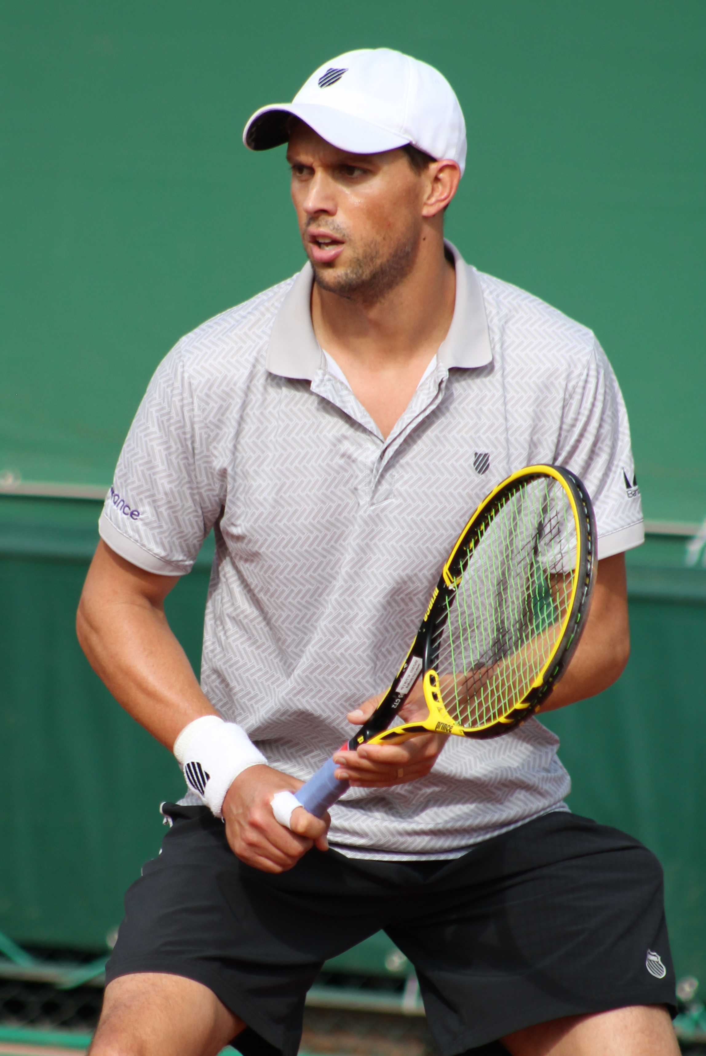 Bryan M. RG15 (5)